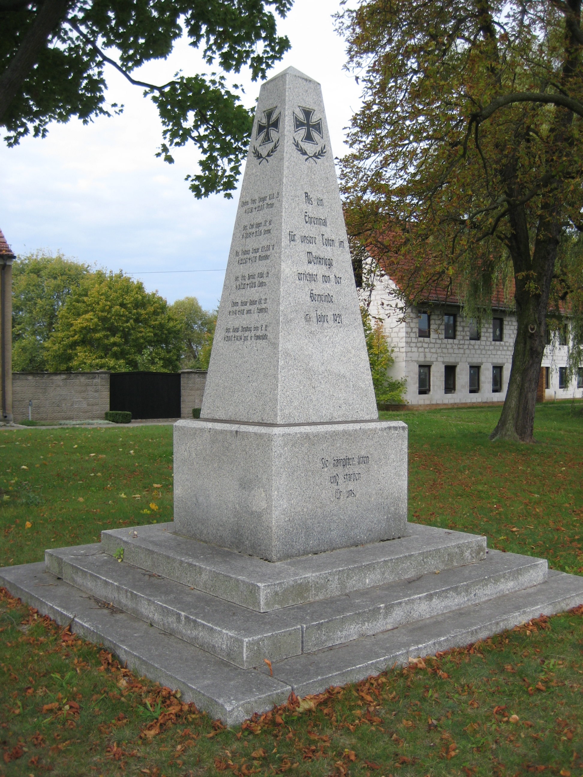 Frankenfelde - Denkmal 1.Weltkrieg